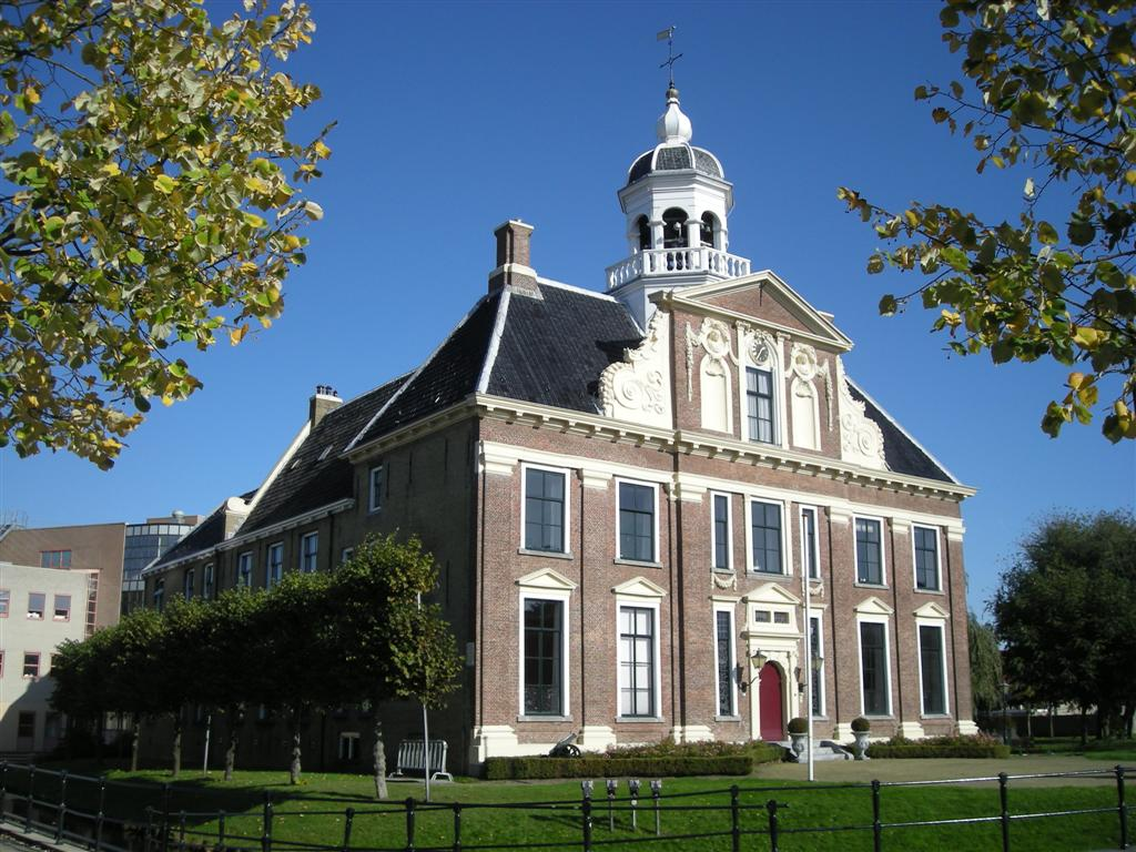 Crackstate, deel gemeentehuis, Heerenveen